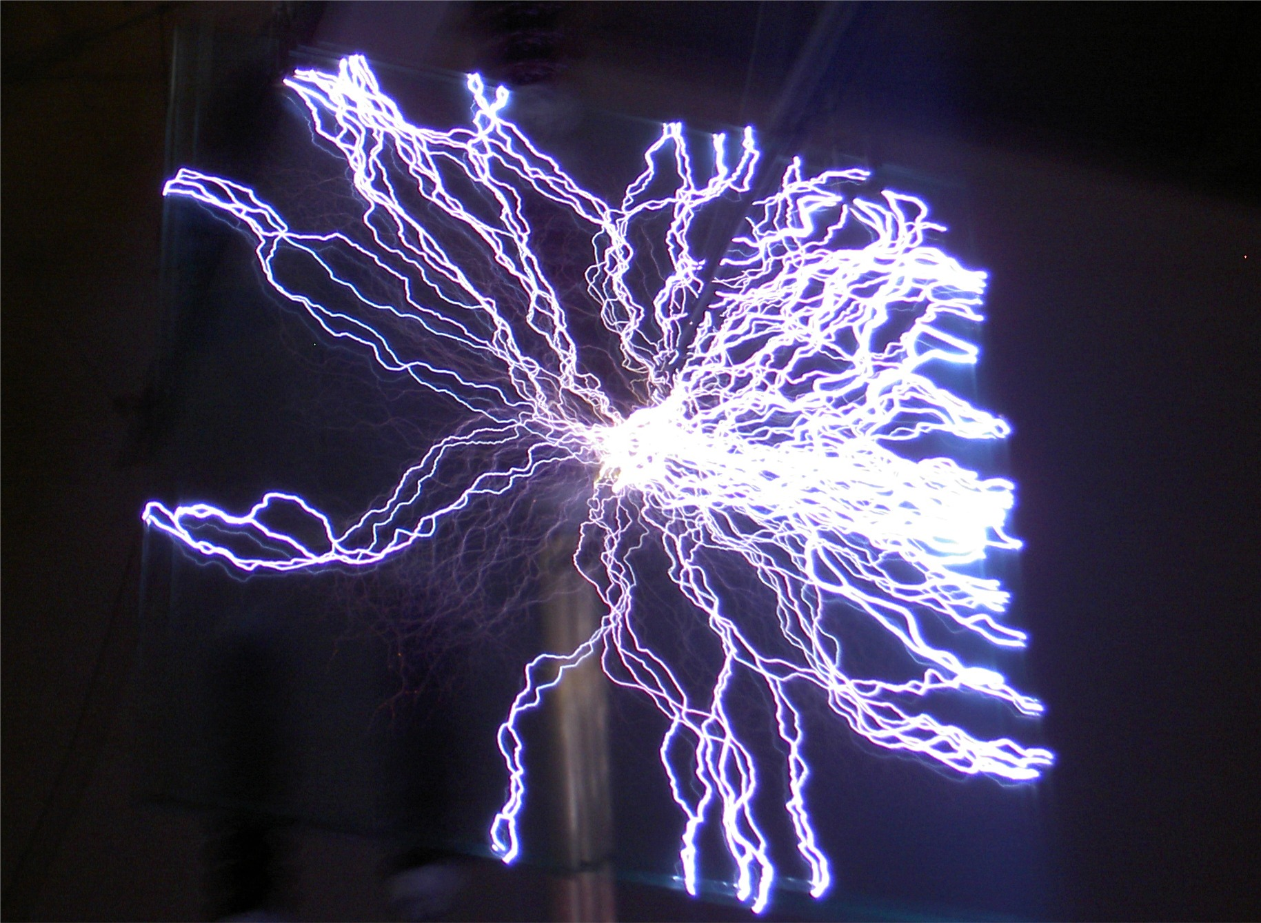 Elektrische Gasentladung um eine Glasplatte.